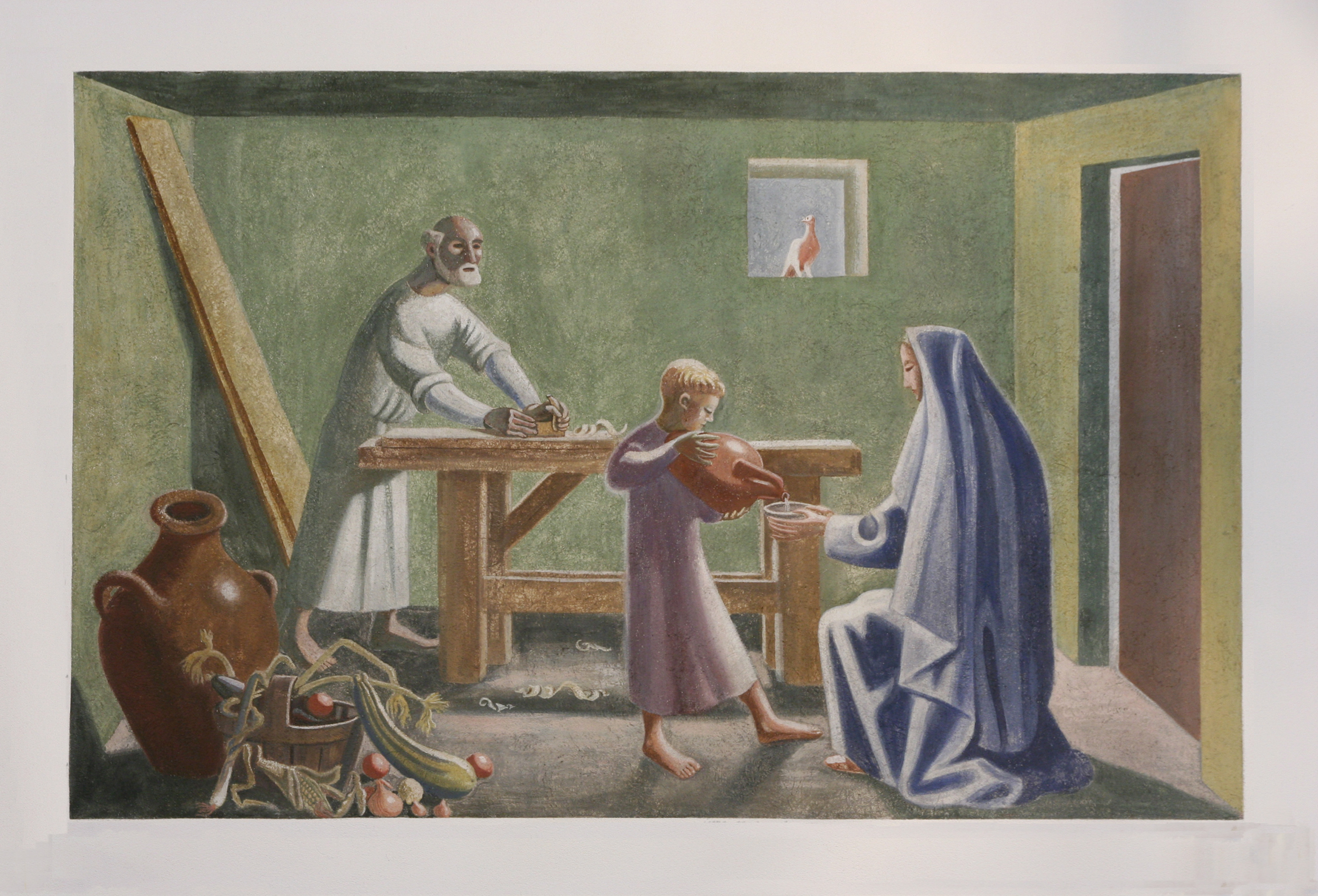 Römisch-katholische Pfarrkirche St. Theresia Zürich-Friesenberg, Fresko von Richard Seewald